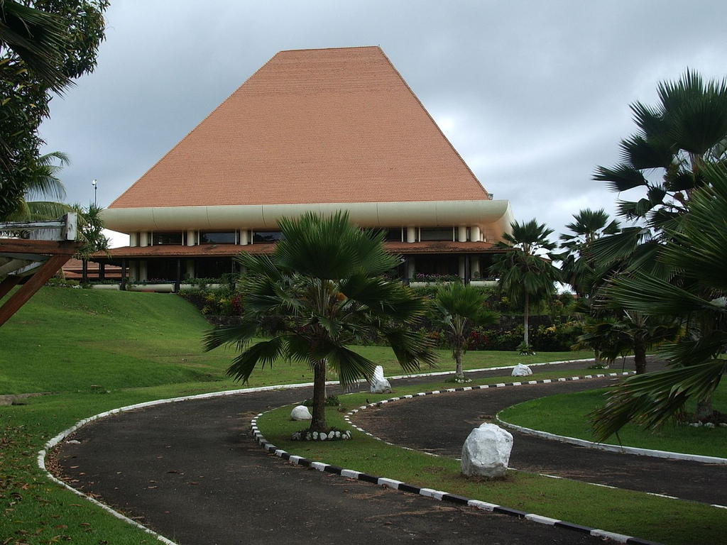 Fijian parliament house in Suva.